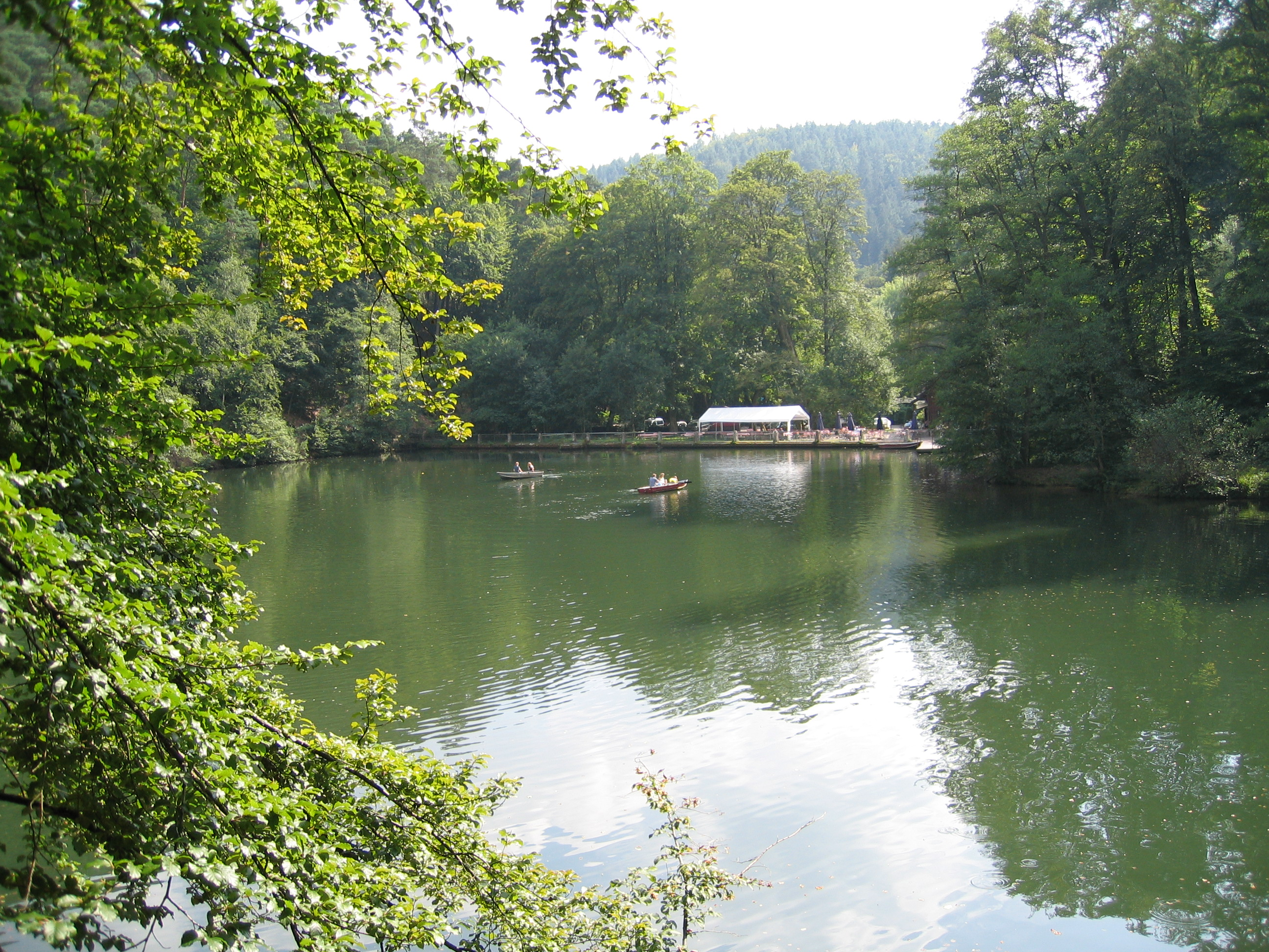 Isenachweiher, Kahnpartie